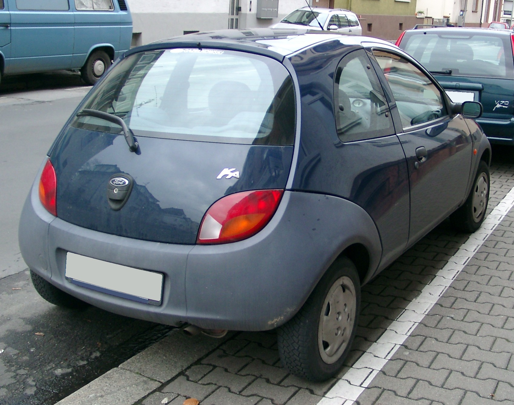 Ford Ka